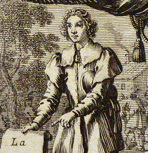 Brécourt, gravure de Jean Le Pautre (détail)en frontispice de "Nopce de village", publiée en 1666 et 1682. BNF estampes, cliché personnel.